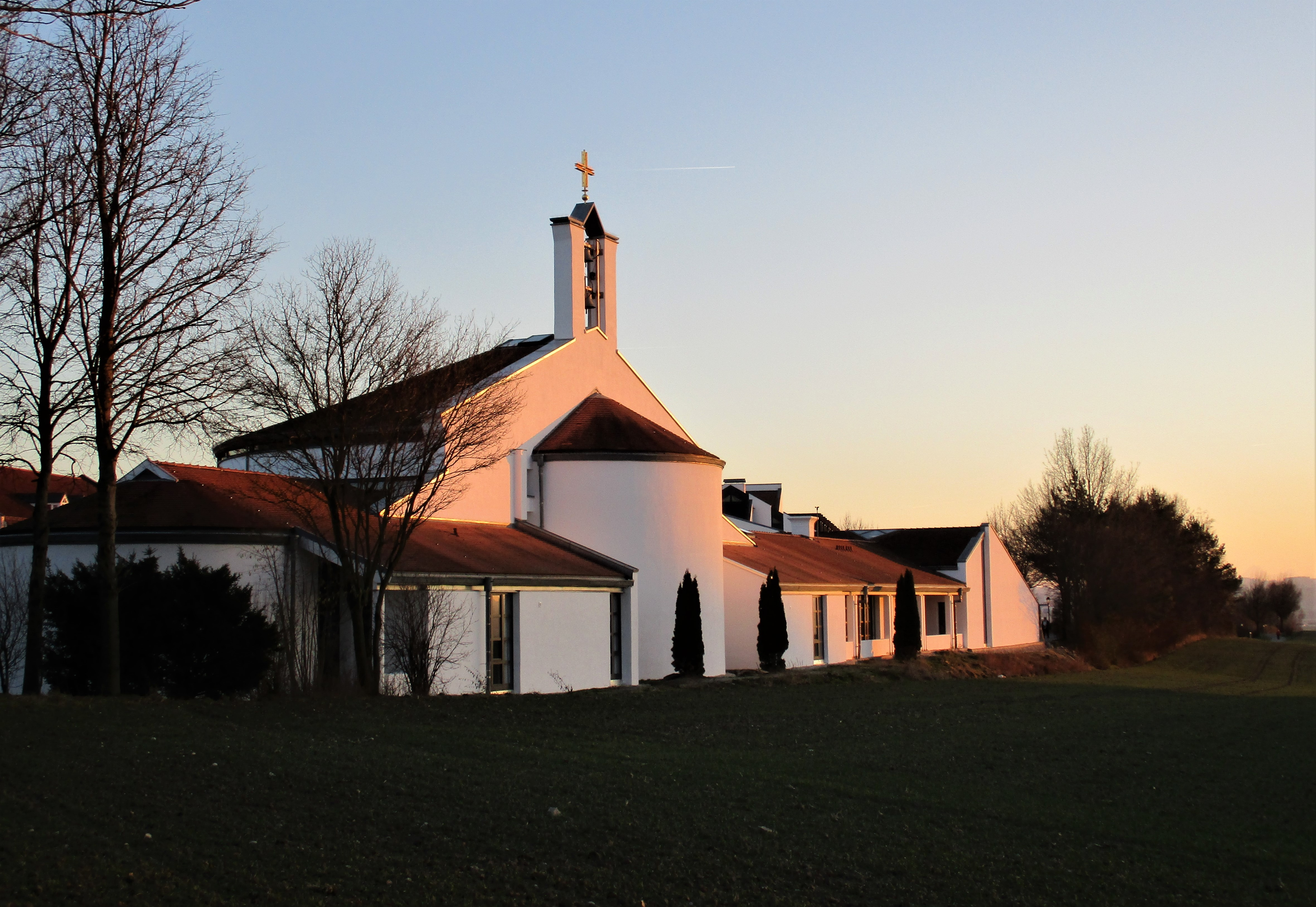 Emmauskirche und Ökumenisches Kurseelsorgezentrum, Kurallee 2, Bad Griesbach im Rottal (Ansicht von Nordwesten)